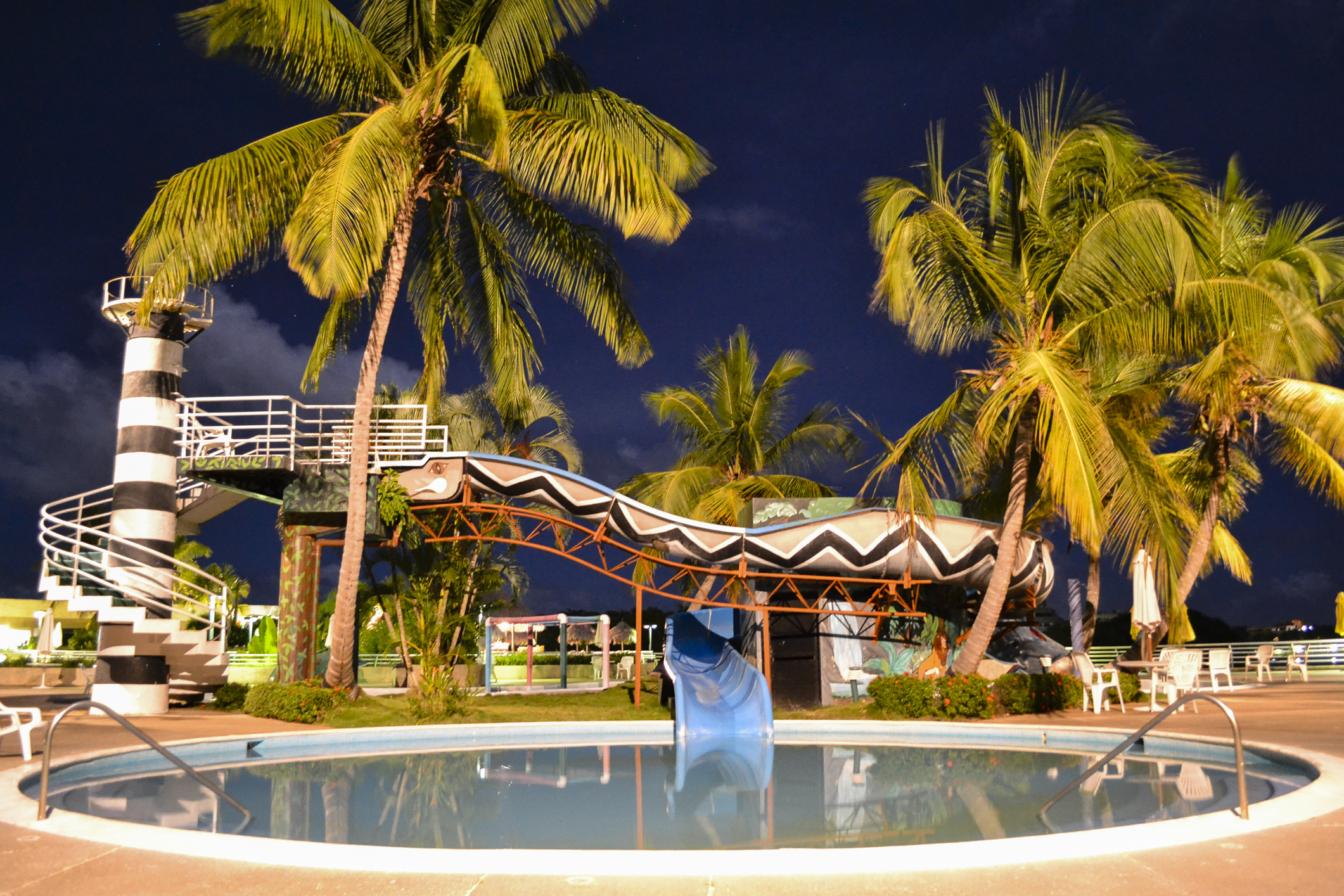 Las Olas Club Resort